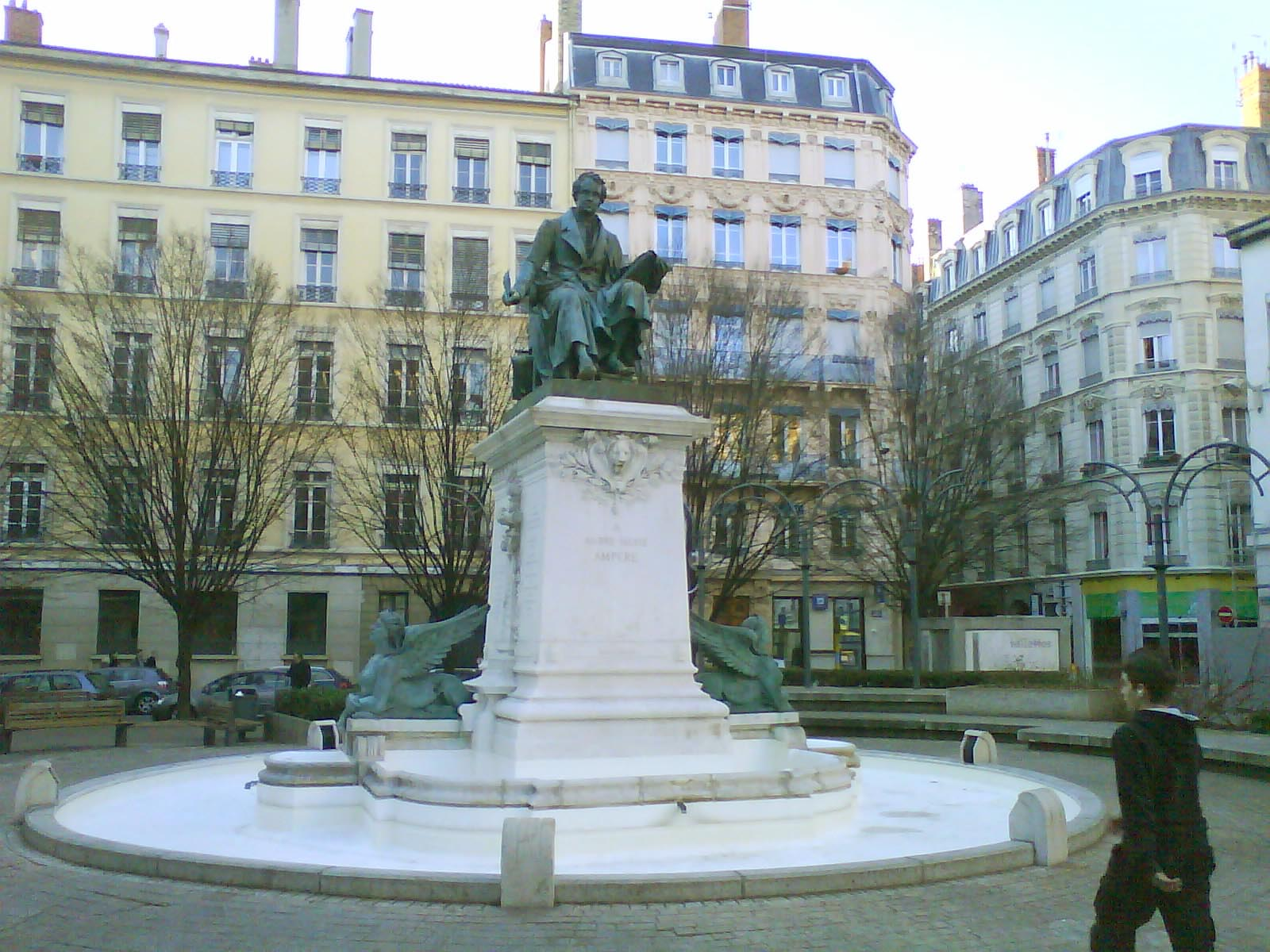 Statue d'Ampère, sur la place Ampère, Lyon 69002